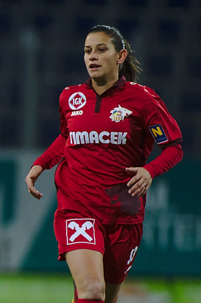 UEFA Women's Champions League Round of 32, SKN St. Pölten vs Brøndby IF am 5.10.2016. Bild zeigt Rafaela de Miranda Travalao